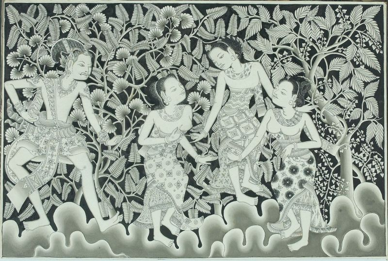 Tekening. Prins Panji in een hof met drie vrouwen.